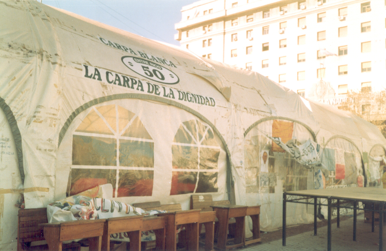 La denominada "Carpa blanca", instalada por docentes argentinos, situada en la Plaza de los dos Congresos por más de un año como forma de protesta.